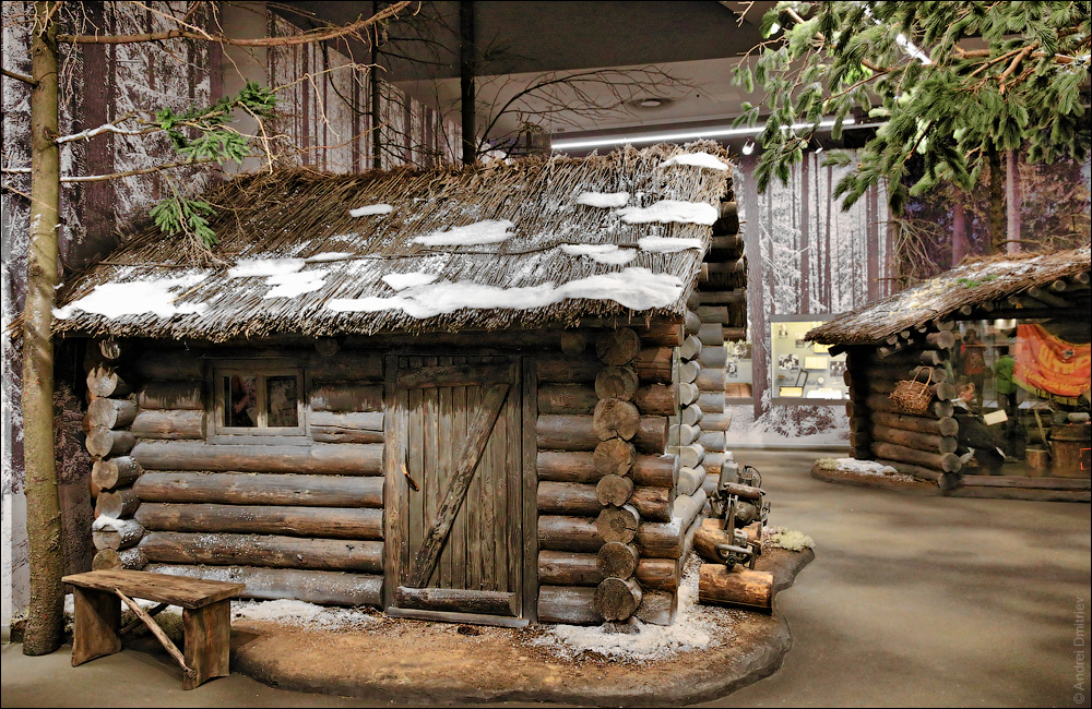 Экпазіцыя музея ВАв